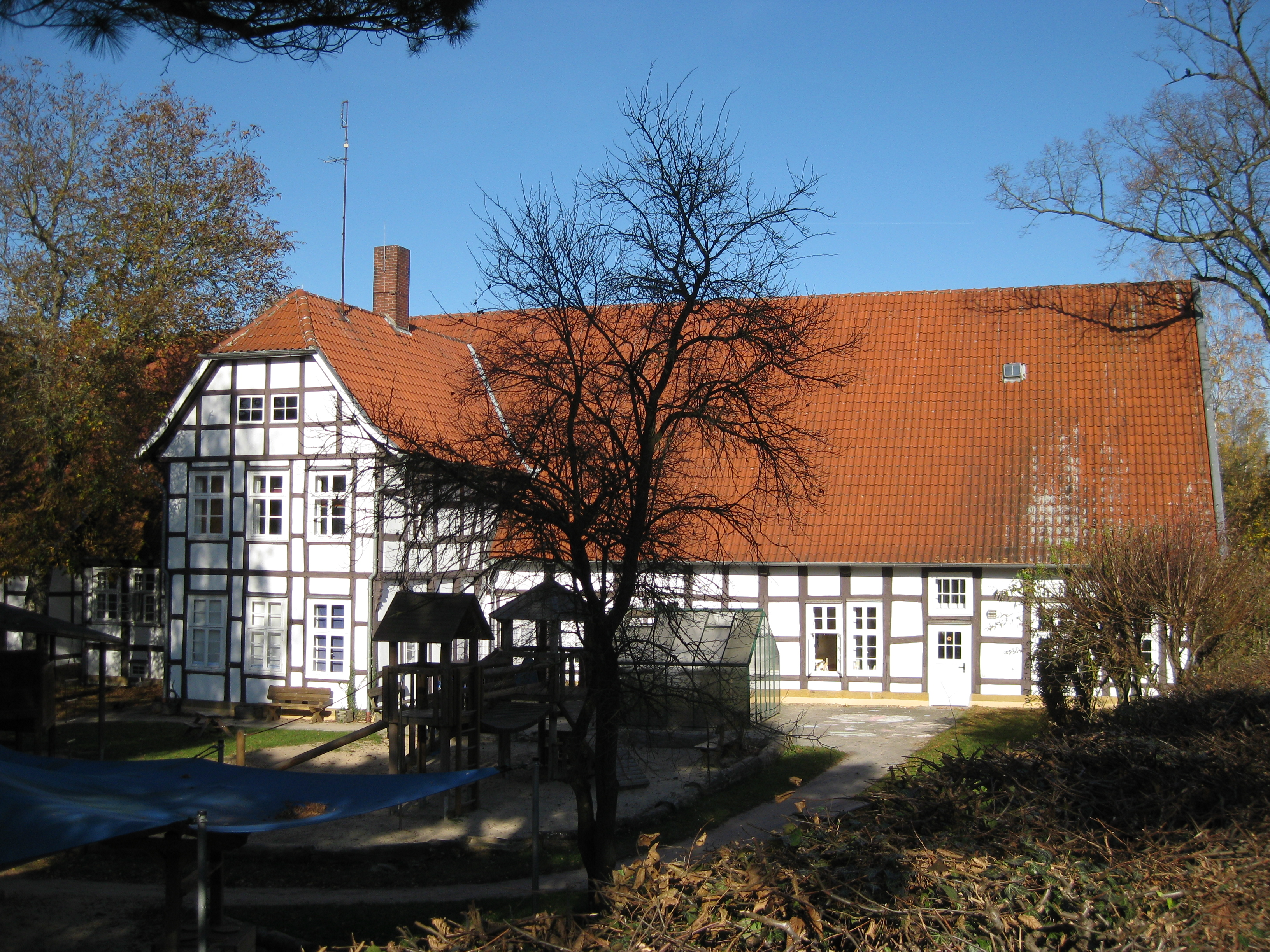 Baudenkmal Am Laibach 33, Halle (Westfalen)